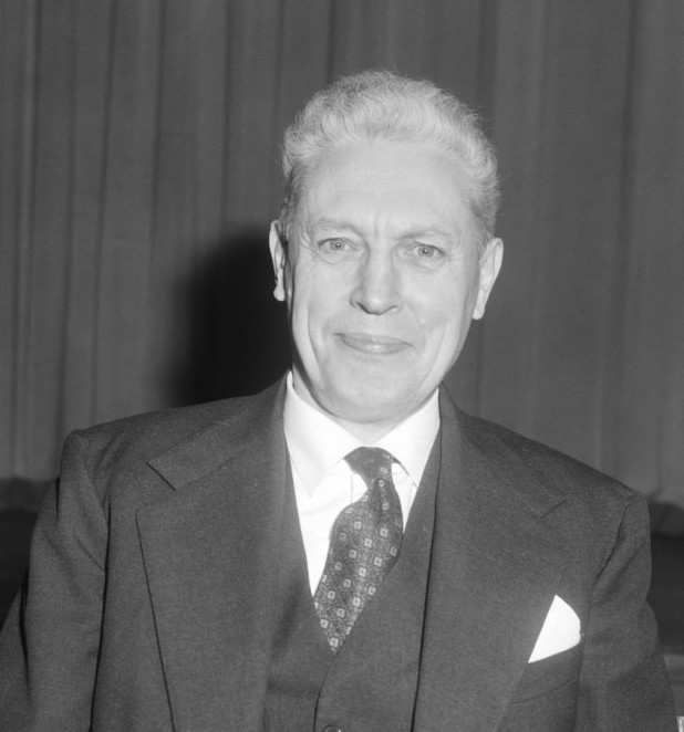 Bijeenkomst Partij van de Arbeid in Krasnapolsky, Henry Fayat (kop) minister van Buitenlandse Zaken België